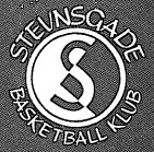 Gammelt SBBK Logo